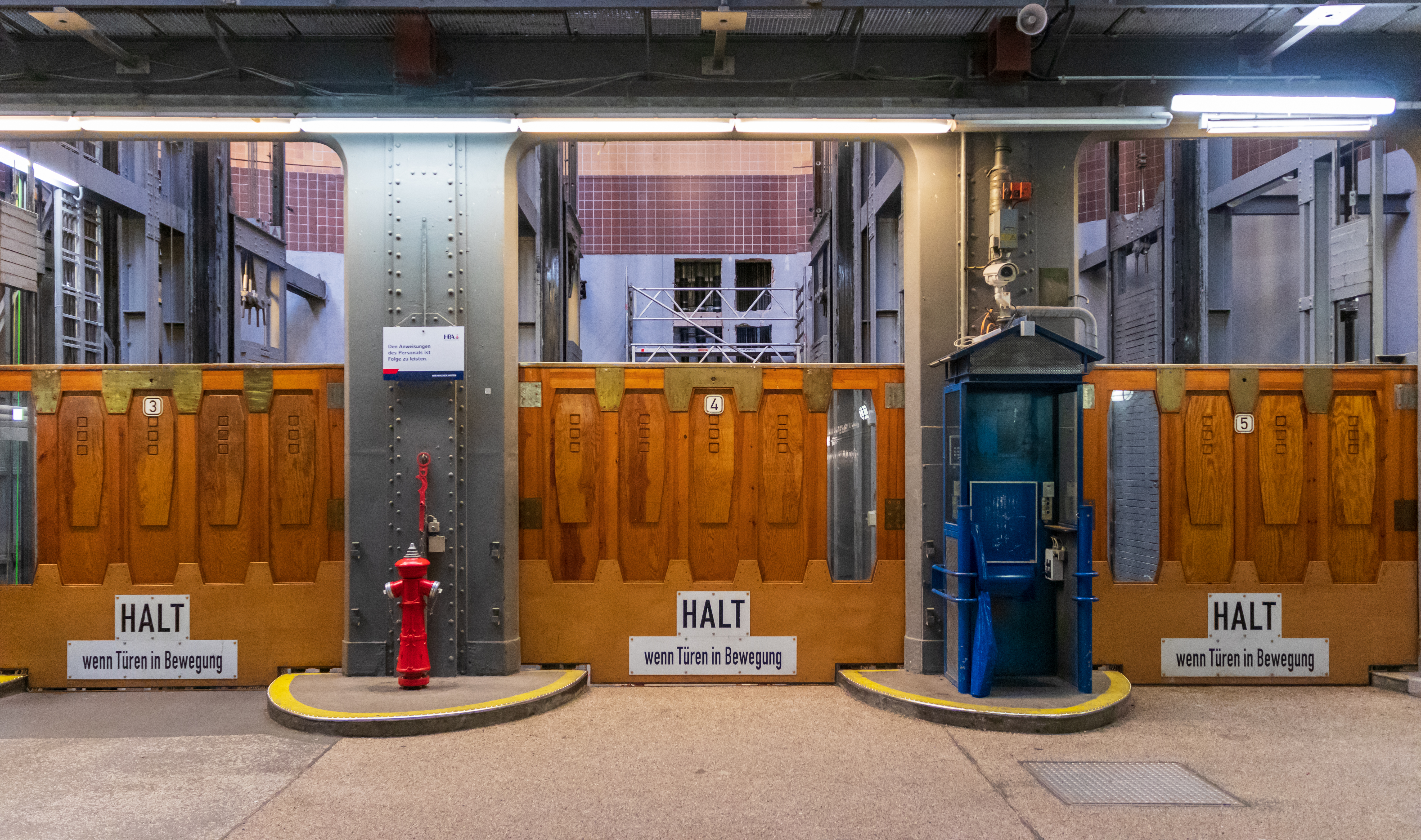 Alter Elbtunnel – Fahrzeugfahrstuhl am Nordeingang